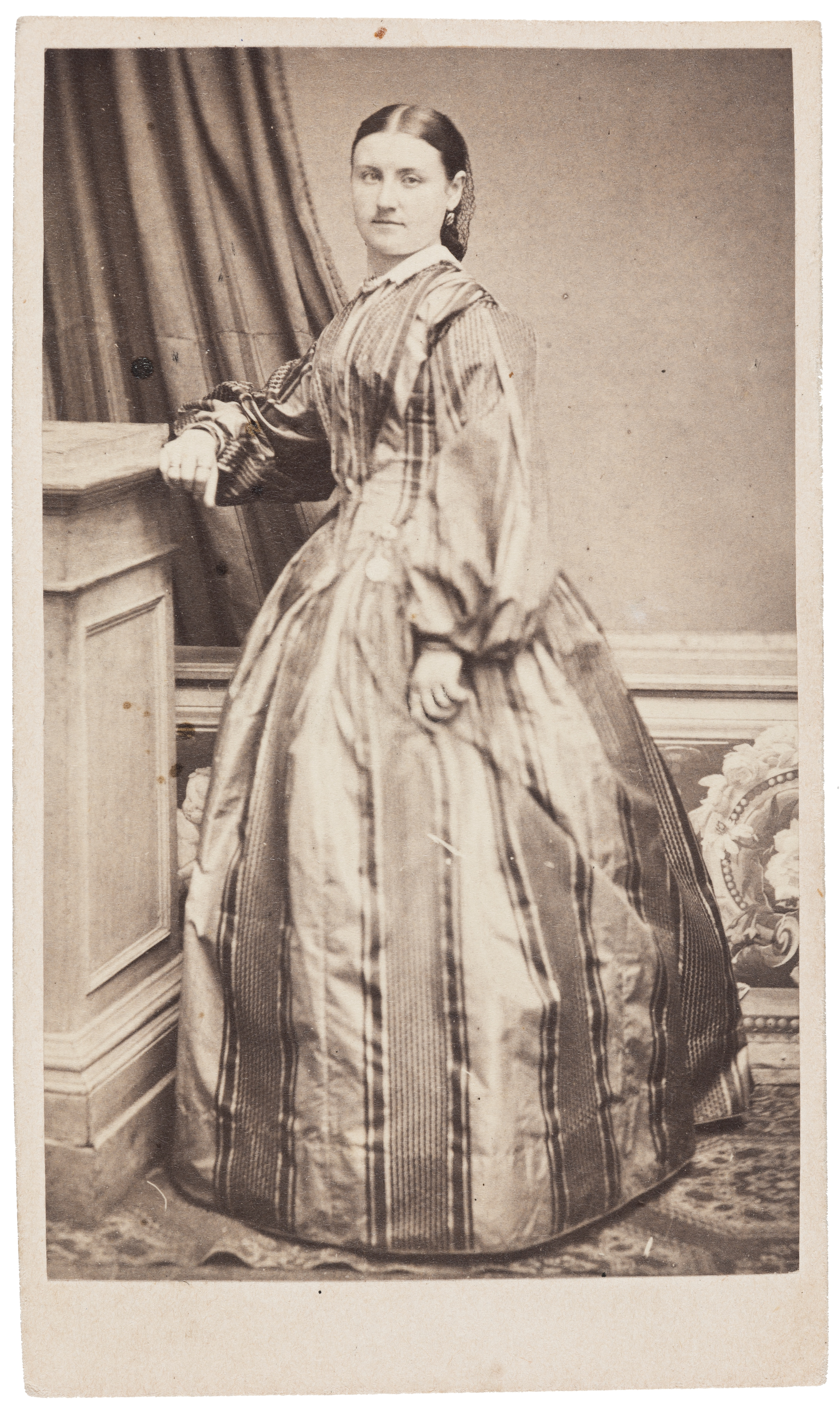 tanssija Alina Frasa